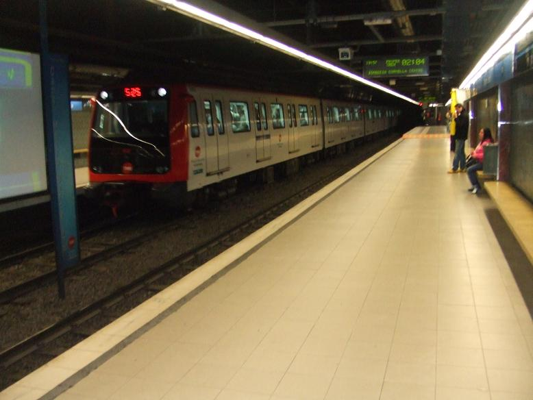 Tren de la serie 5000 de la L5 del metro de Barcelona en Diagonal.